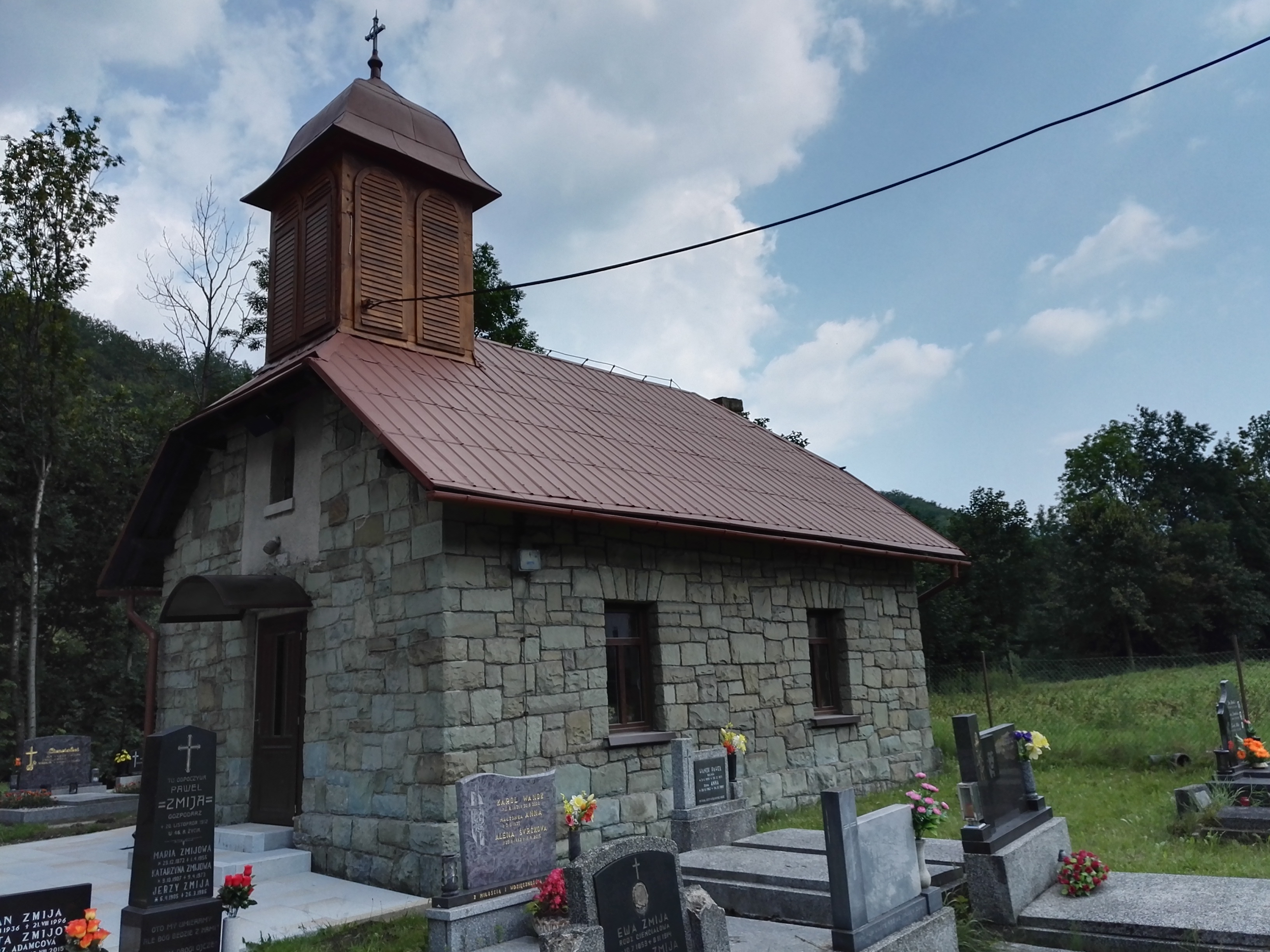 Řeka, kaple na evangelickém hřbitově